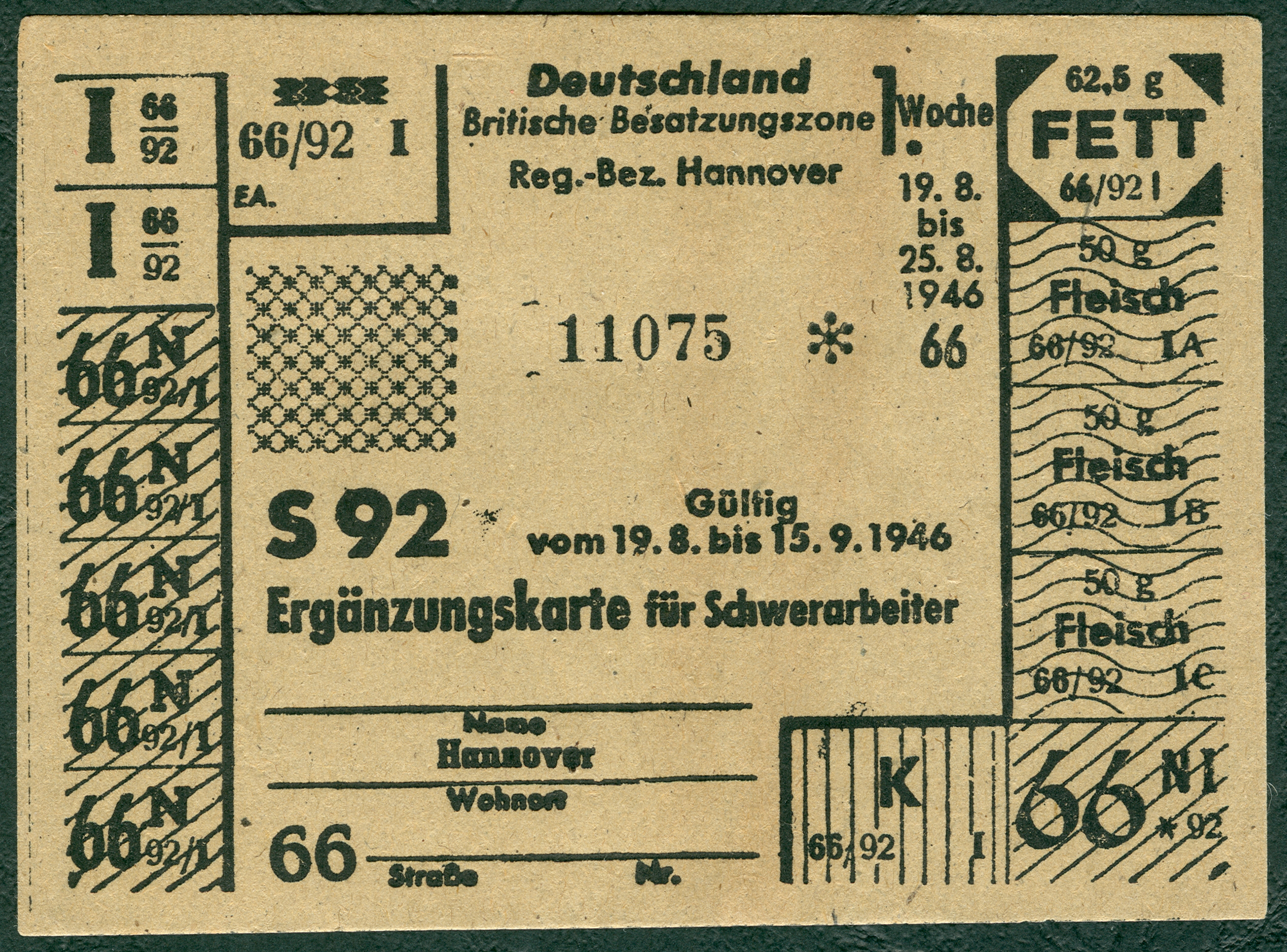 Lebensmittel-Ergänzungskarte S 92 (66/92) vom August 1946 für Schwerarbeiter in der Britischen Besatzungszone in Deutschland, Regierungsbezirk Hannover, Sonderrationen zum Beispiel für Fett und Fleisch. Die Marken waren vier Wochen gültig. Das graubraune Papier ist rückseitg blanco, hat ein verschlungenes Wasserzeichen und die Maße ca. 10,4 cm x 7,1 cm.